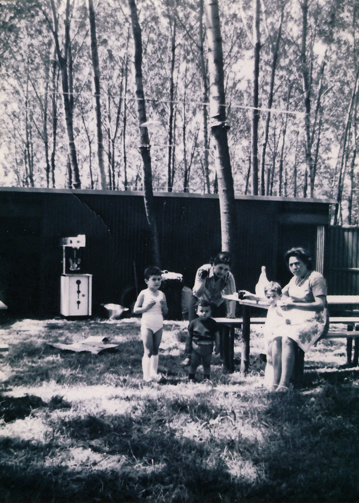 L'Osteria ai Pioppi nel 1969 con la famiglia di Bruno Ferrin.